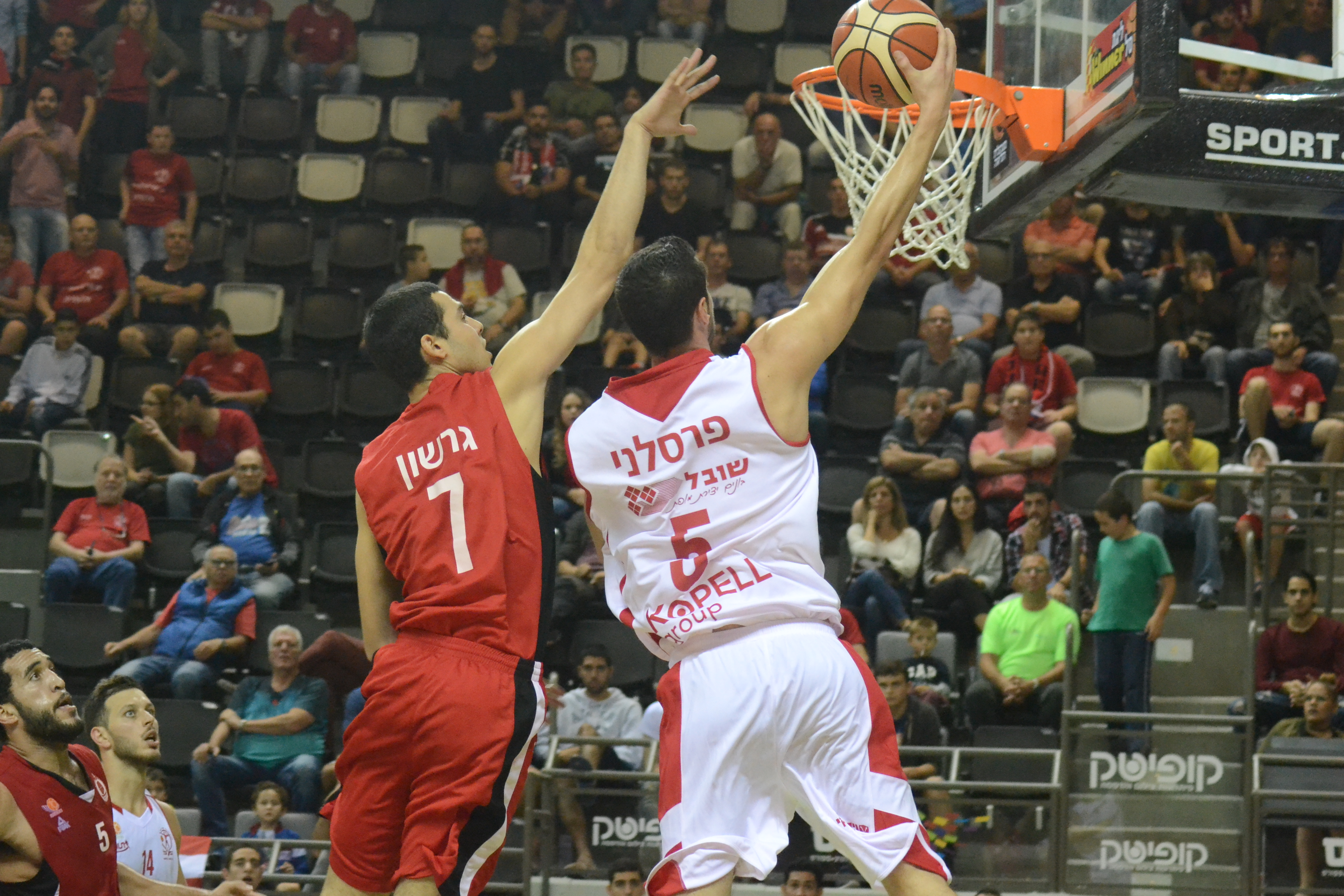 משחק כדורסל בין הפועל חיפה להפועל עפולה עונת 2016/17